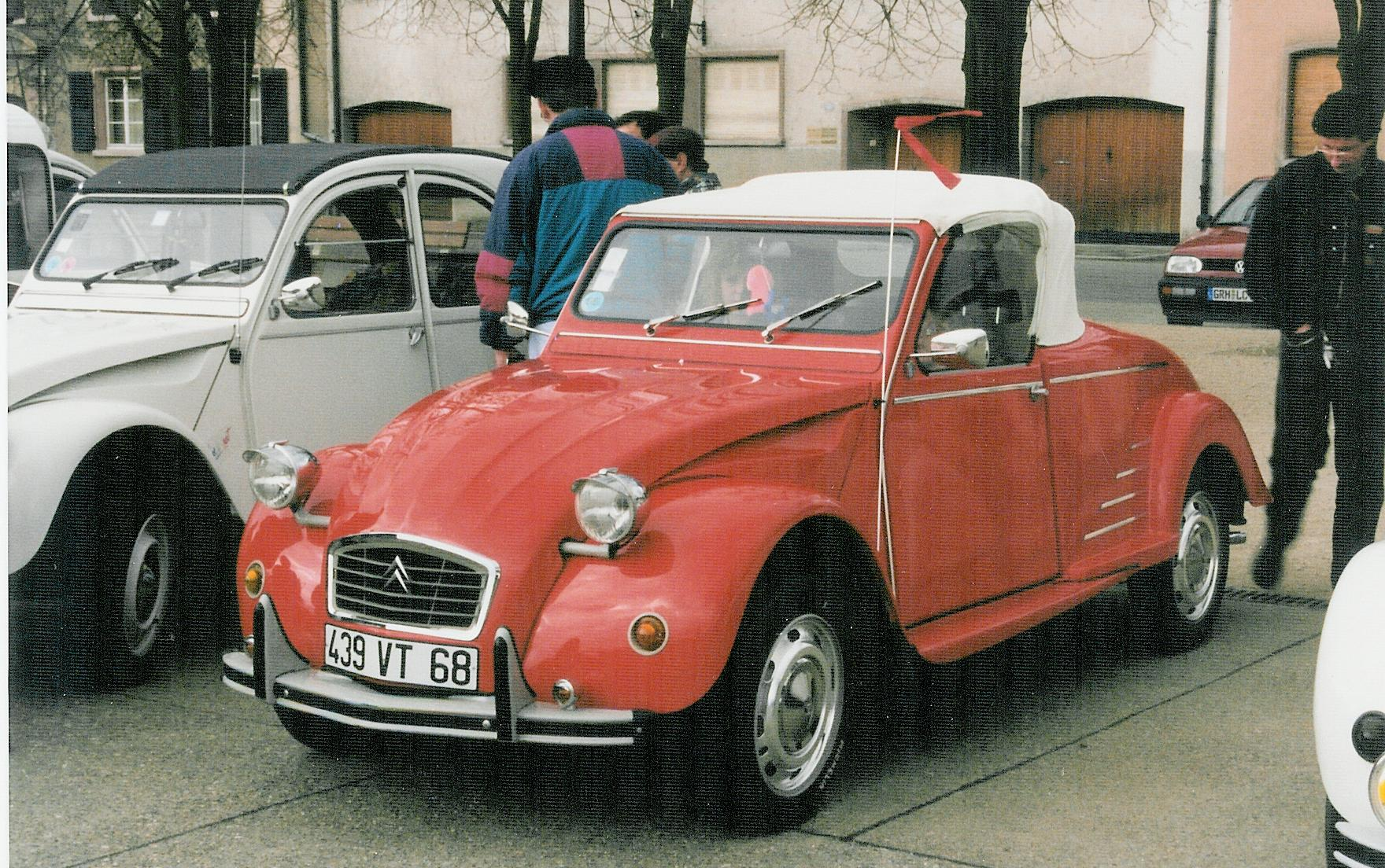 Kit cabriolet pour 2CV modele Hoffman